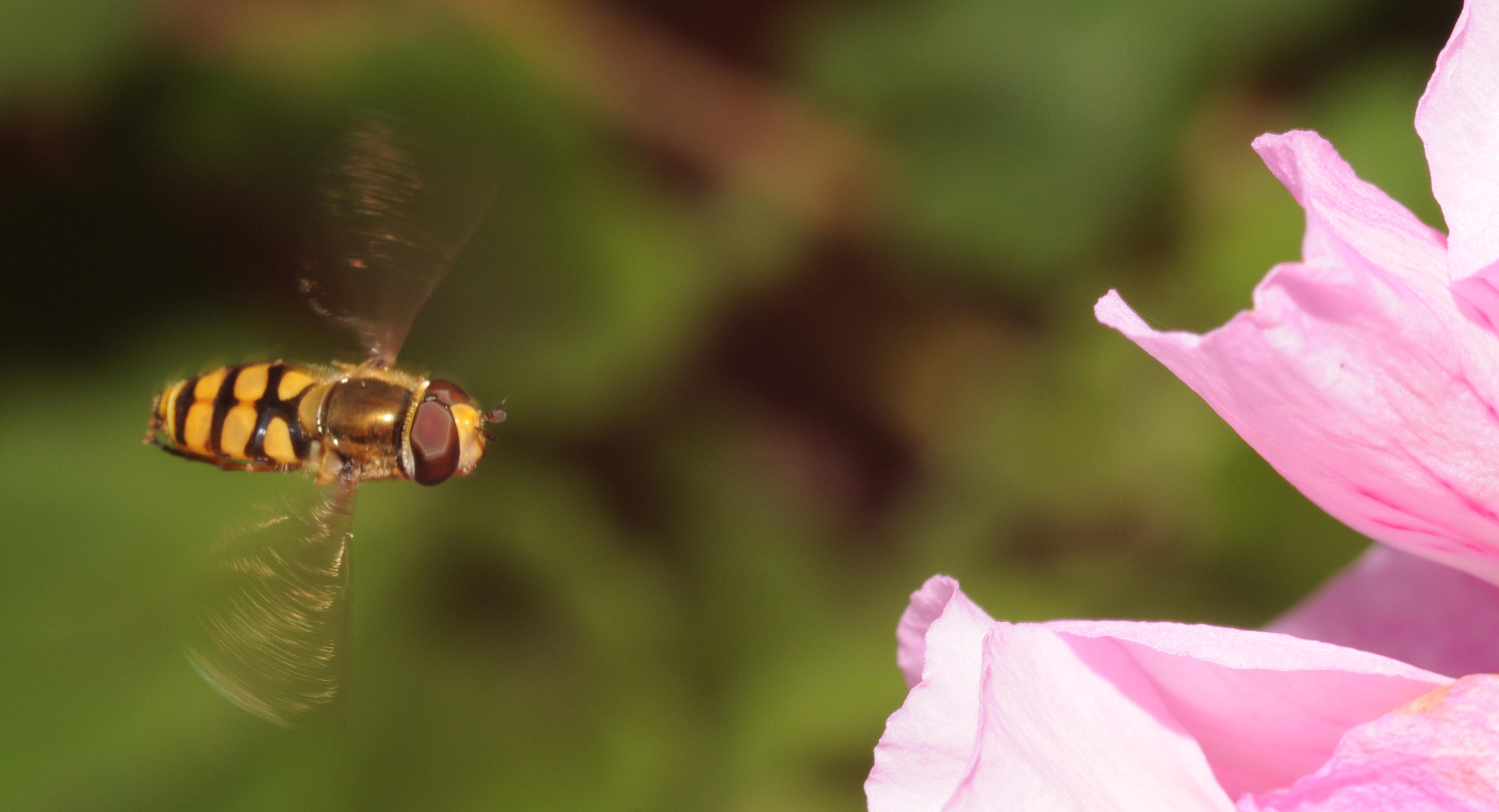 Syrphe en vol.